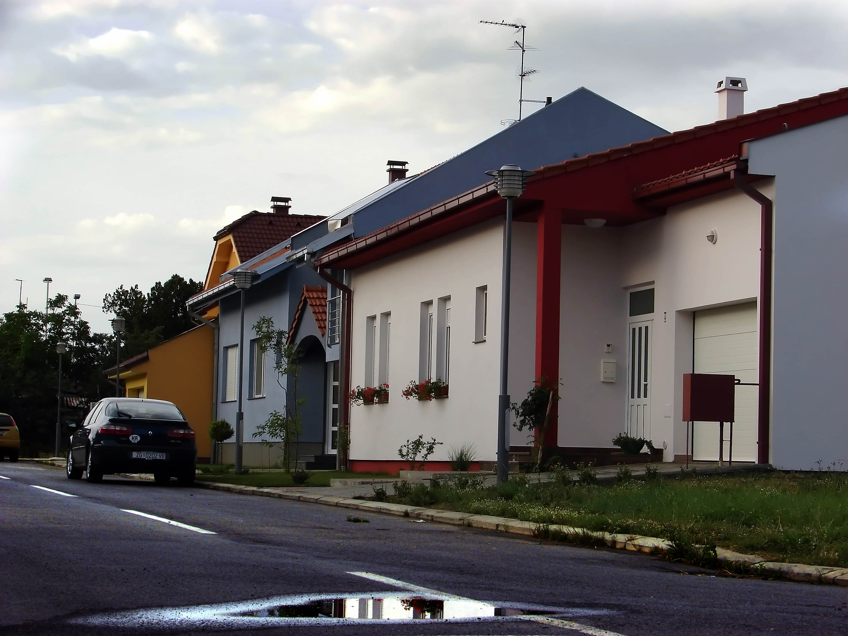 Tik poslije kiše. Igra boja na osječkim fasadama.